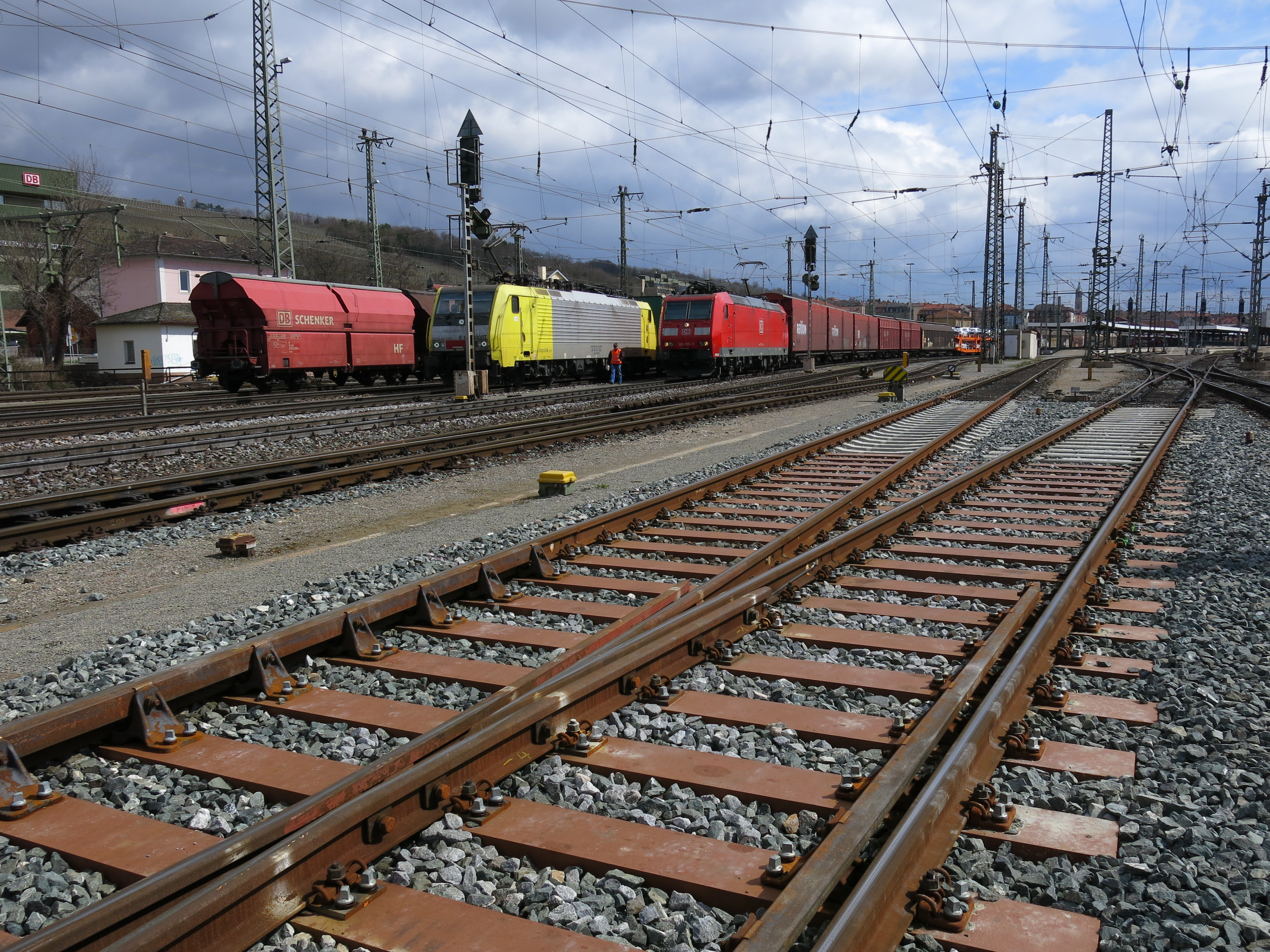 DB AG